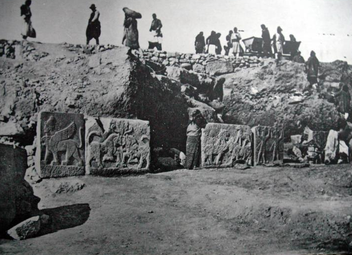 British Museum'un finanse ettiği Karkamış kazılarından bir görüntü.